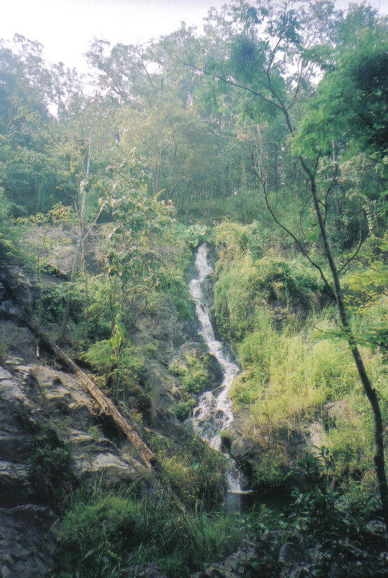 Khlong Wang Chao National Park Kamphaeng Phet, Thailand